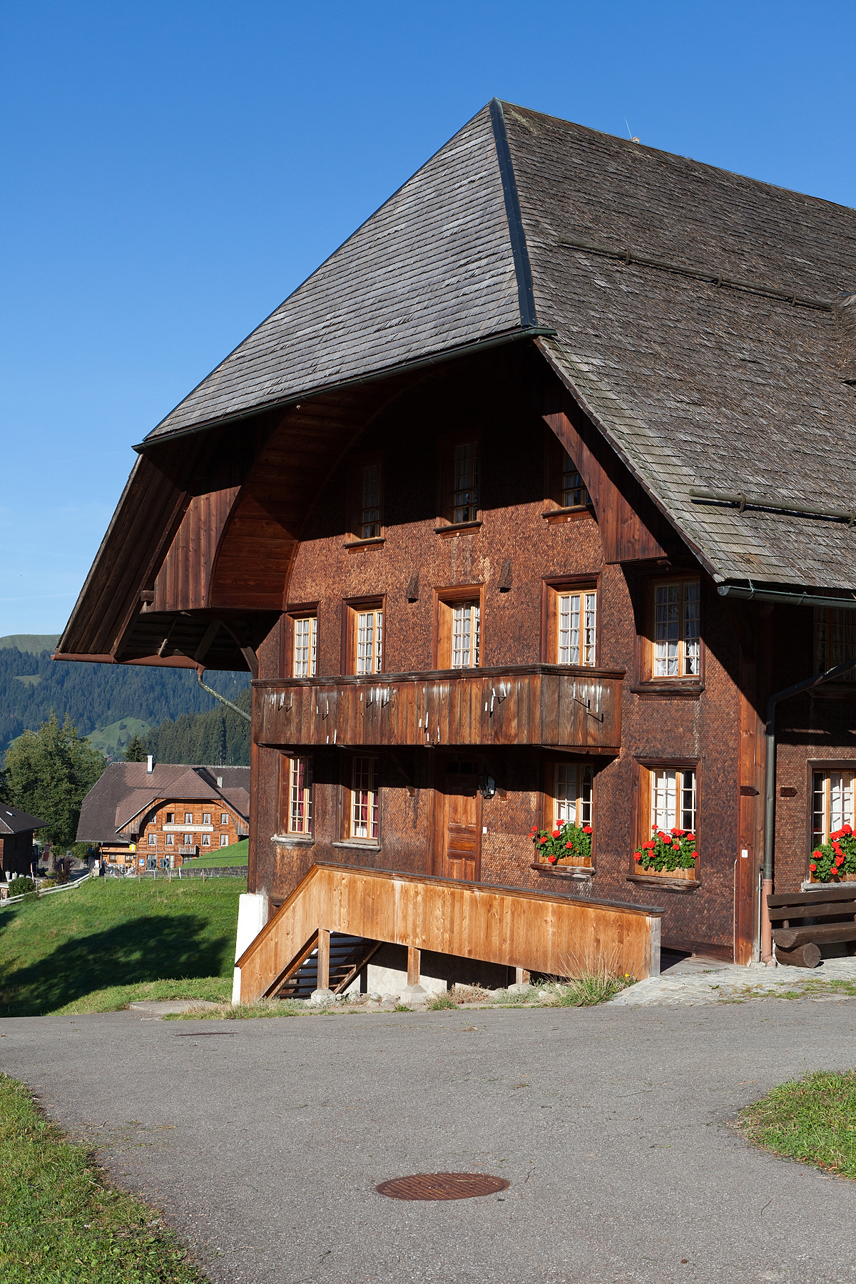 Altes Schulhaus in Schangnau im Emmental (BE)